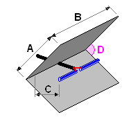 Dessin antenne dièdre avec cotes auteur : F5ZV dessiné par F5ZV le 26/02/2006